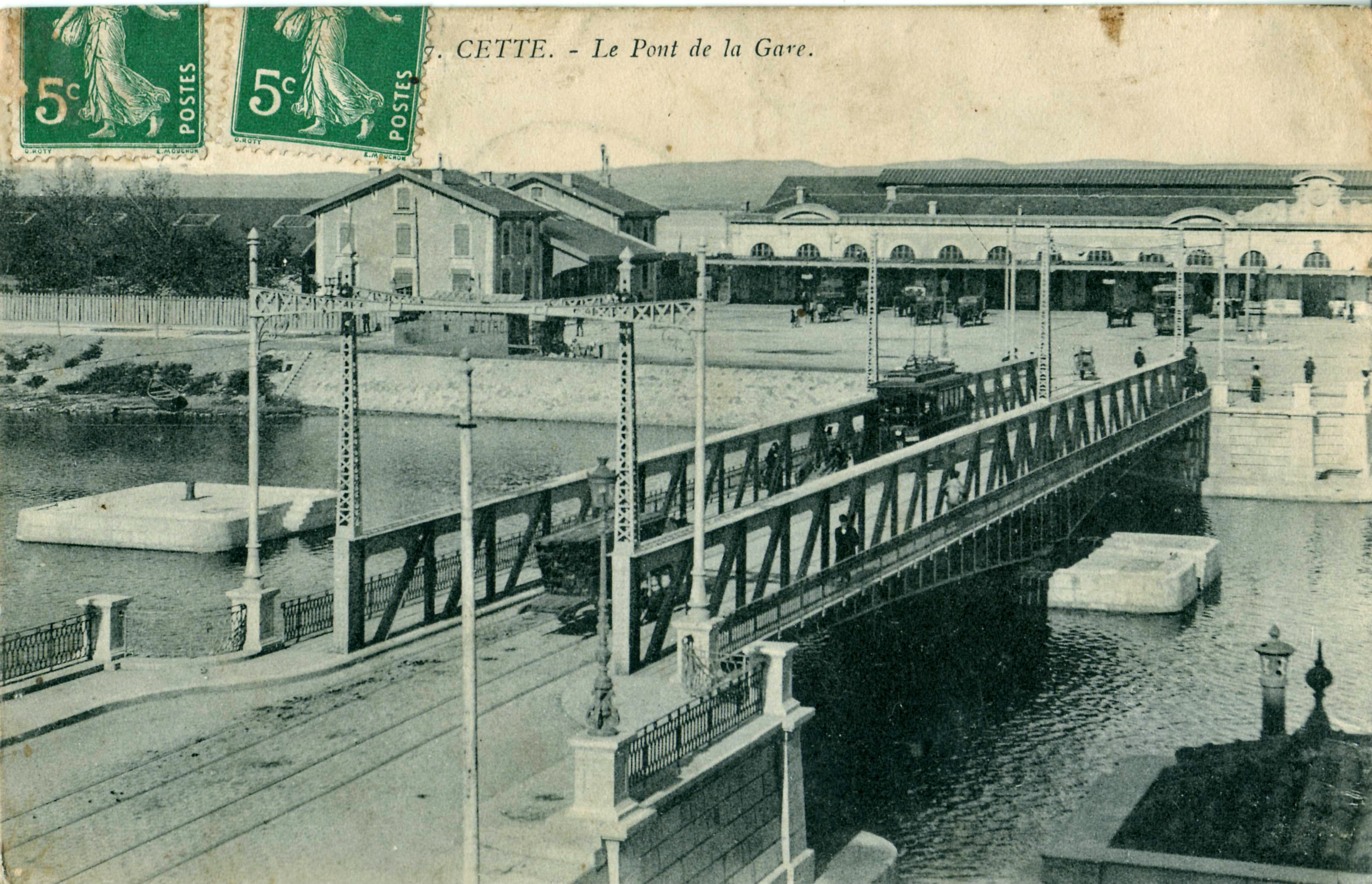 Carte postale ancienne sans mention d'éditeur, n°7: CETTE - Le Pont de la Gare